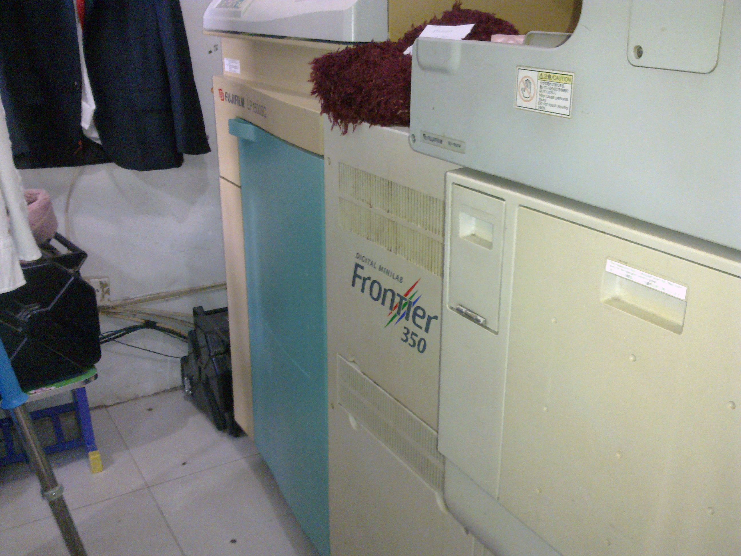 这是一台正在冲洗的富士胶片Frontier 350设备，使用RA-4药水，图片中这台机器位于盱眙县的白天鹅照相馆，每小时可以出片1300张（近似）